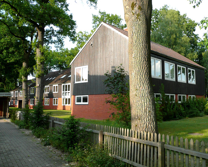 Gebäude Hermannsburger Mission